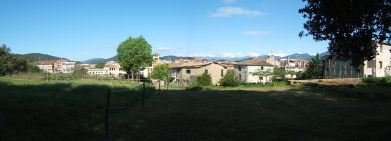 Serinyà